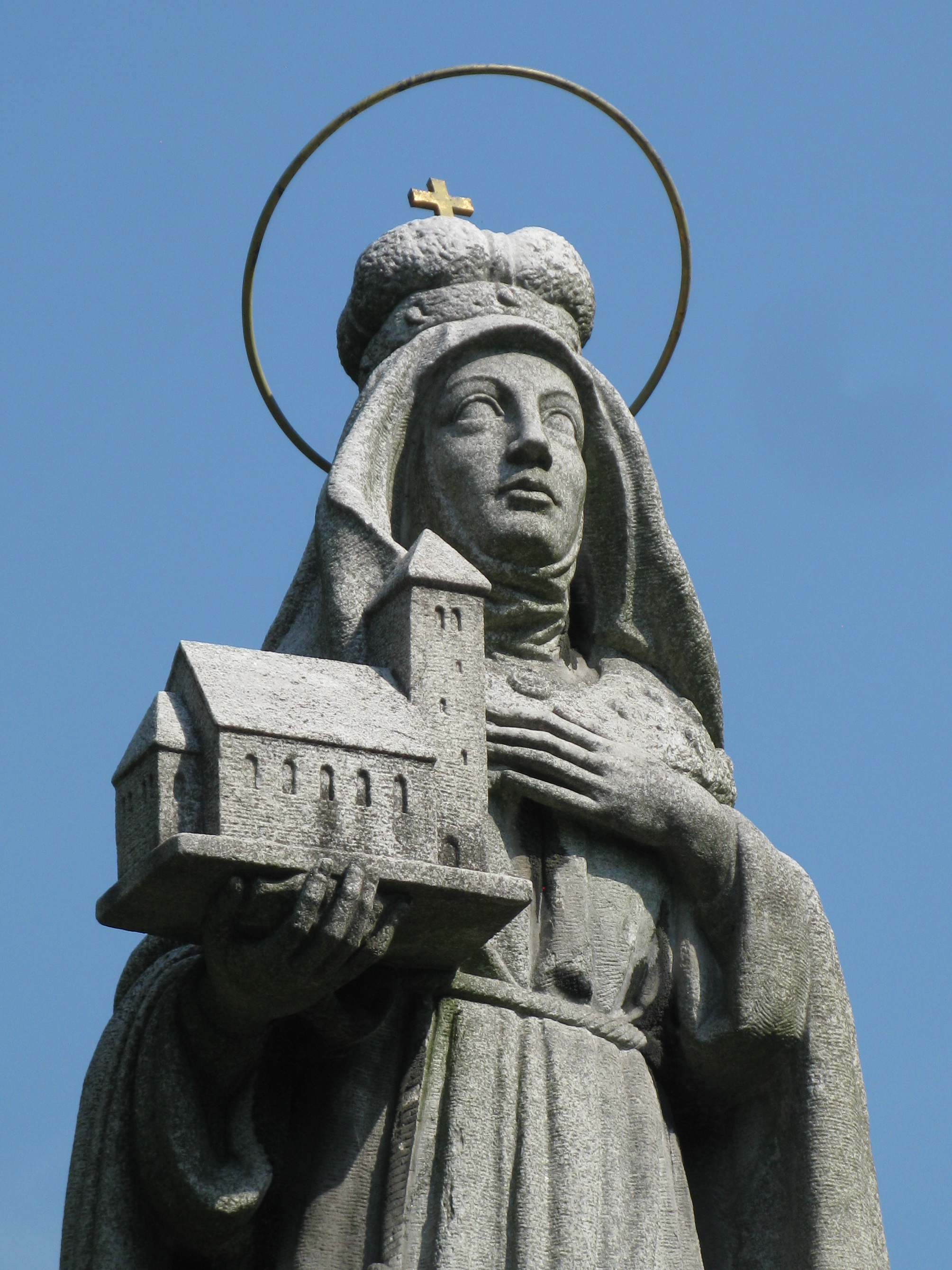 Fragment rzeźby przedstawiającej św. Jadwigę przy kościele św. Jadwigi w Zabrzu-Porembie.